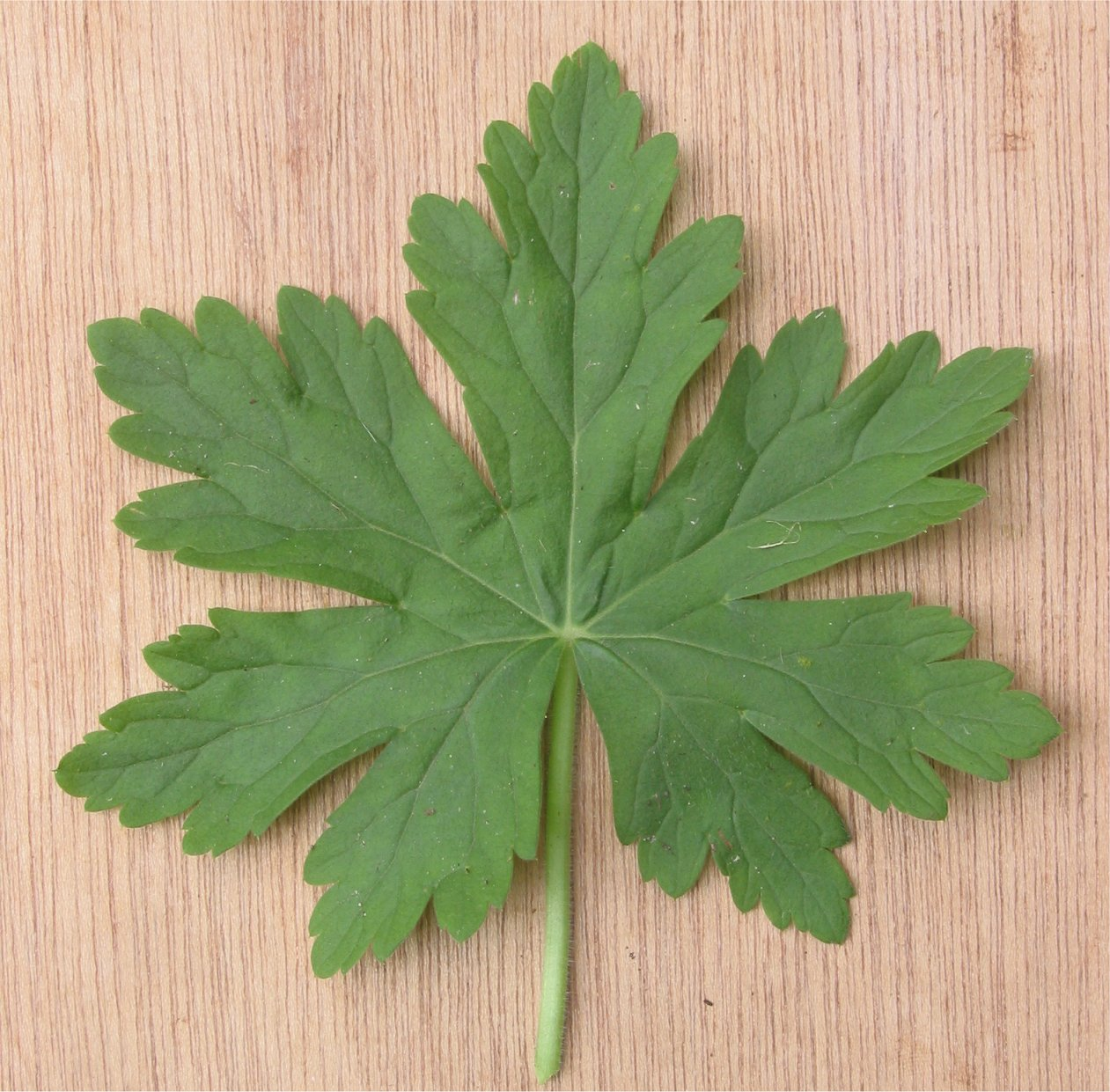 Geranium macrorhiza leaf (blad)